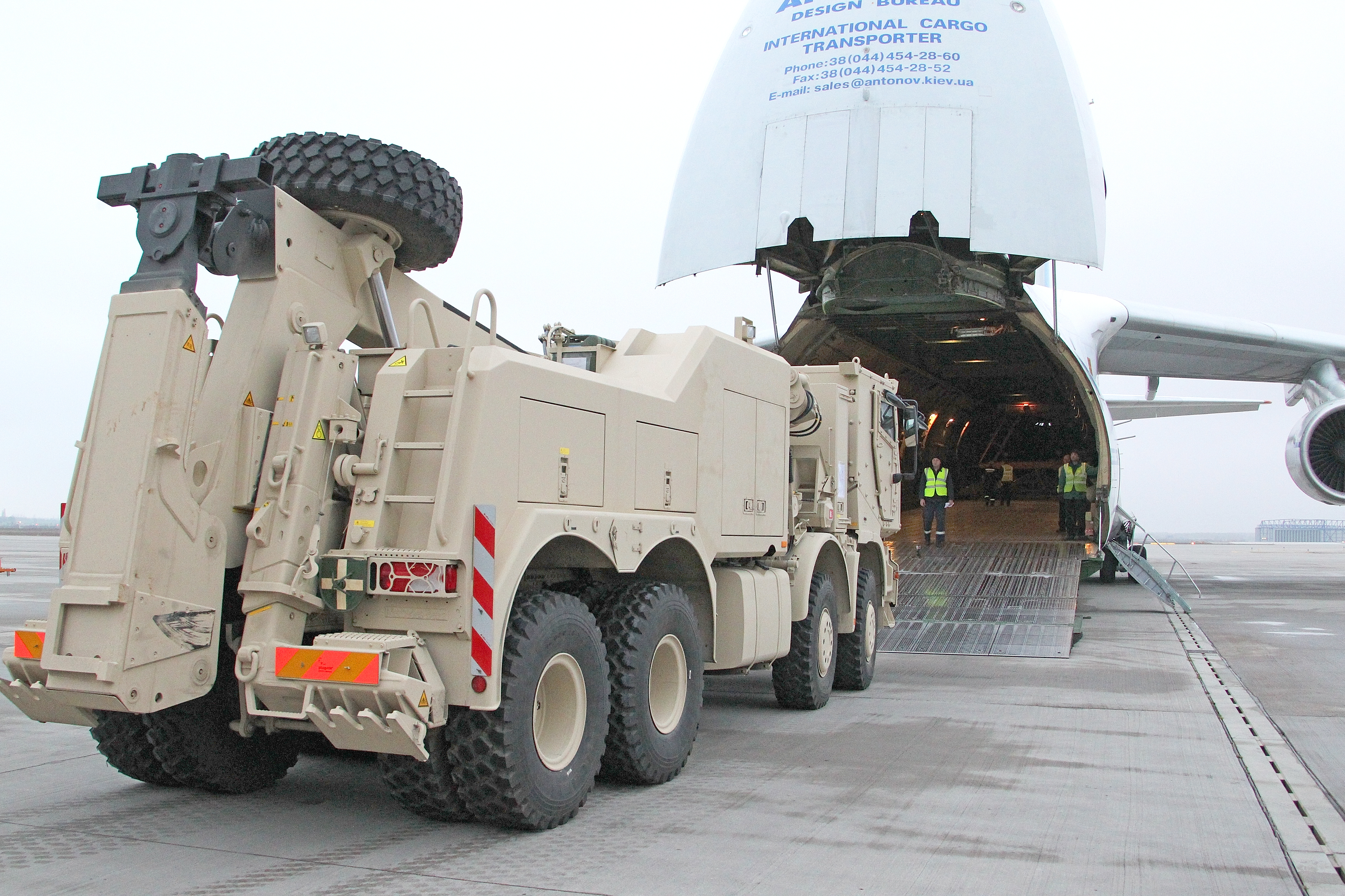 Das schwere geschützte Berge- und Abschleppfahrzeug Bison wird in eine Antonow An-124 am Flughafen Leipzig/Halle verladen. An Flughafen Leipzig/Halle werden mit dem noch in der UdSSR entwickelten Großraumtransporter vom Typ Antonow An-124 Transportflüge nach Afghanistan durchgeführt. © Bundeswehr / Mandt